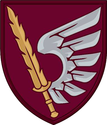 Нарукавний знак, 79 окрема десантно-штурмова бригада